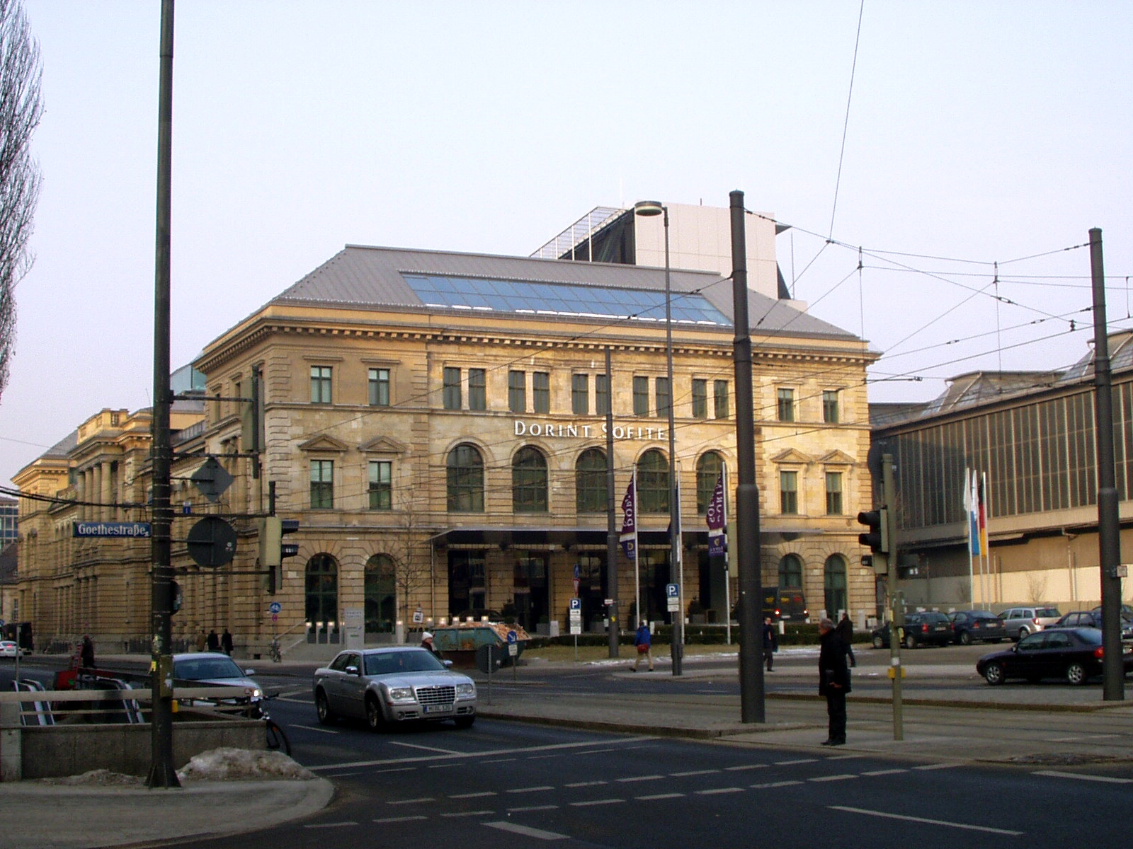 Dorint Sofitel München/MunichDorint Sofitel München